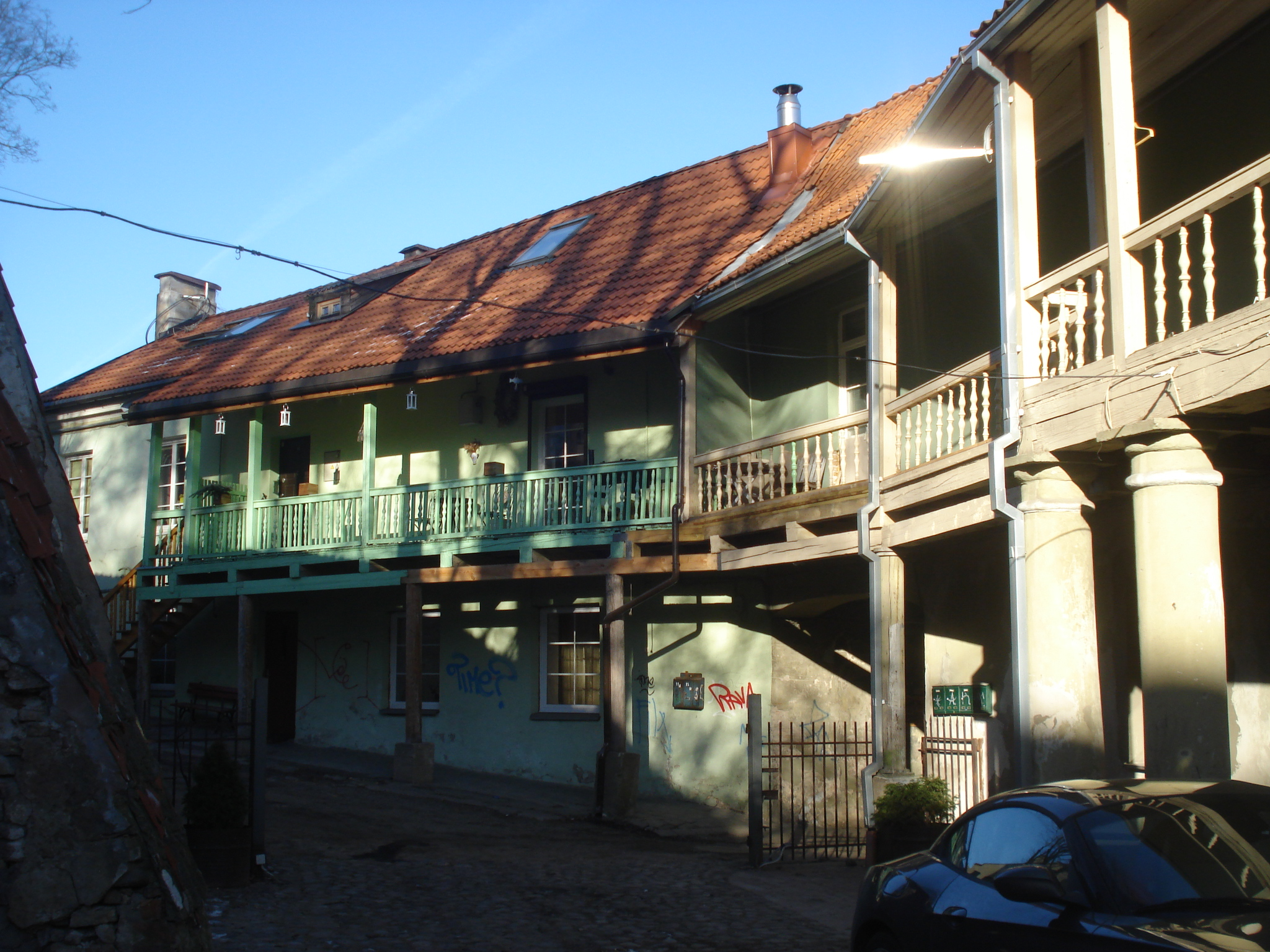 Дом с галереей. Тилто 10, Вильнюс